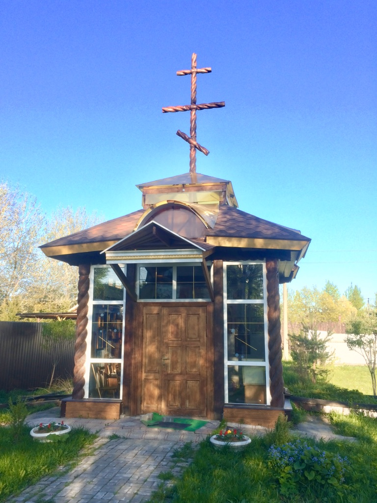 часовня